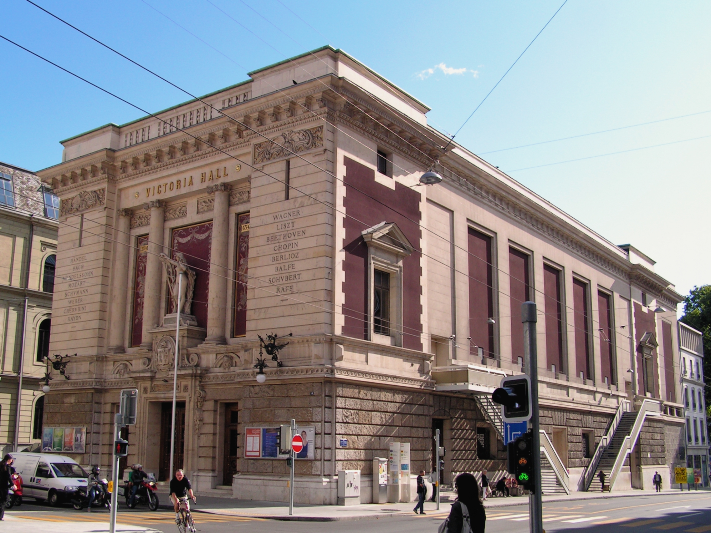 Rue du Général Dufour 14, Genève. Le Victoria Hall.